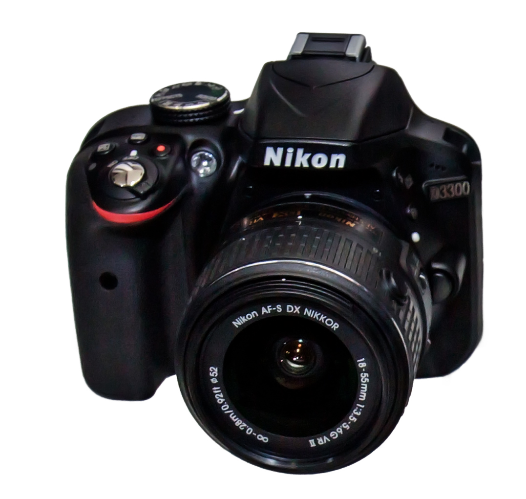 2014 Nikon D3300